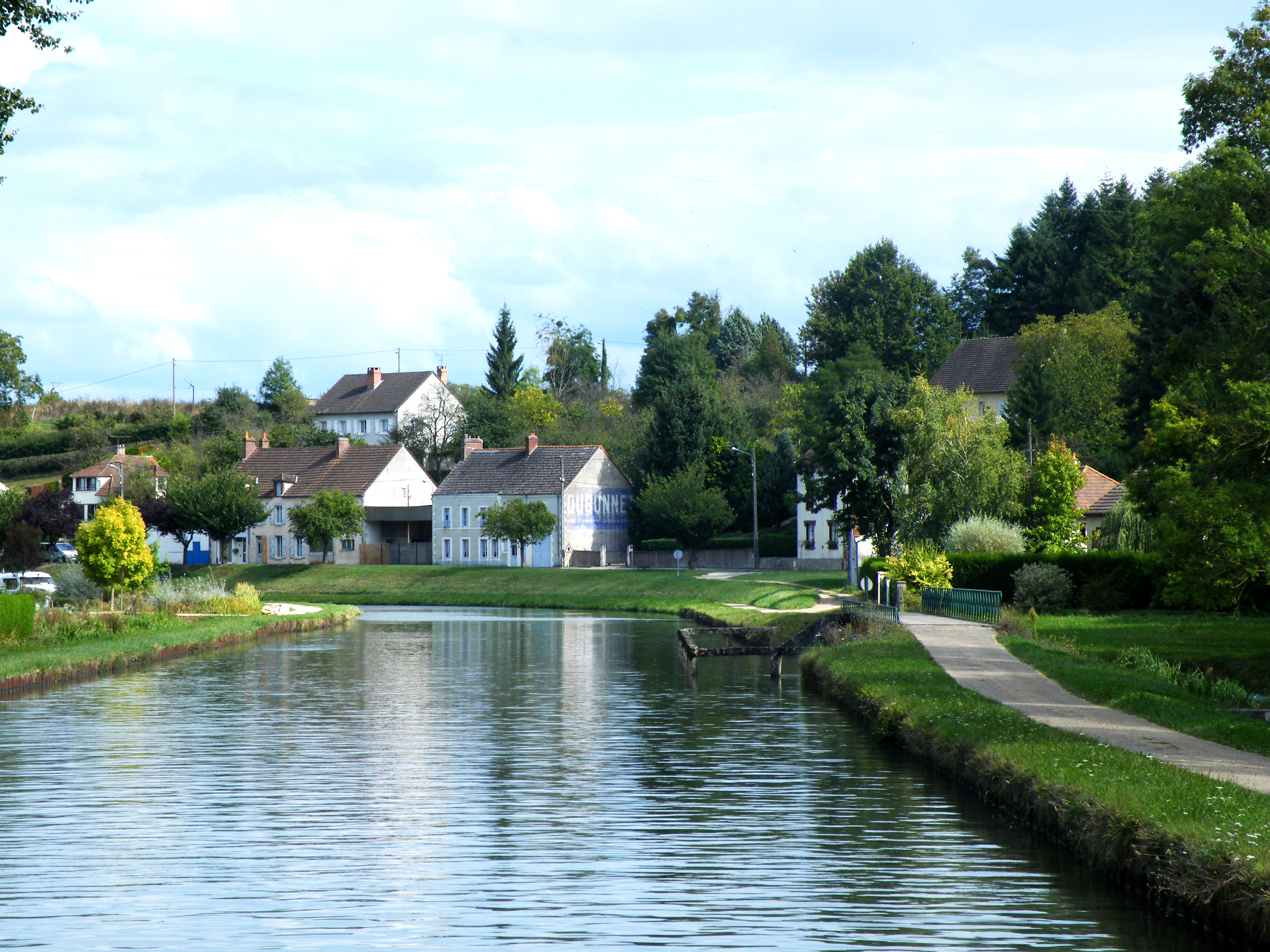 Canal de Briare et la Trézée, Ouzouer-sur-Trézée, Loiret, France. La photo est prise au zoom à environ 600 m en aval du pont de la rue Grande à Ouzouer (à ce pont, la Trézée réintègre le lit du canal). La barrière dans le lit du canal contre la berge ici à droite, se trouve à 400 m du même pont. Elle entoure l'ouverture de la Trézée qui quitte de nouveau le lit du canal et protège le pont qui l'enjambe. Un autre cours d'eau, le ruisseau de l'Aubruyère, arrive par la droite, va jusqu'au canal (sans y pénétrer), le longe sur 53 m puis conflue avec la Trézée juste après le pont que l'on voit ici (sur la droite du pont). Il n'est pas visible sur l'image : il coule nettement en contre-bas du chemin qui longe le canal, au-delà du pont que l'on voit ici.